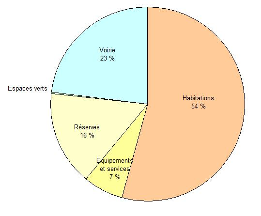 Occupation des sols, dans la zone aménagée de Tougan (Burkina Faso).